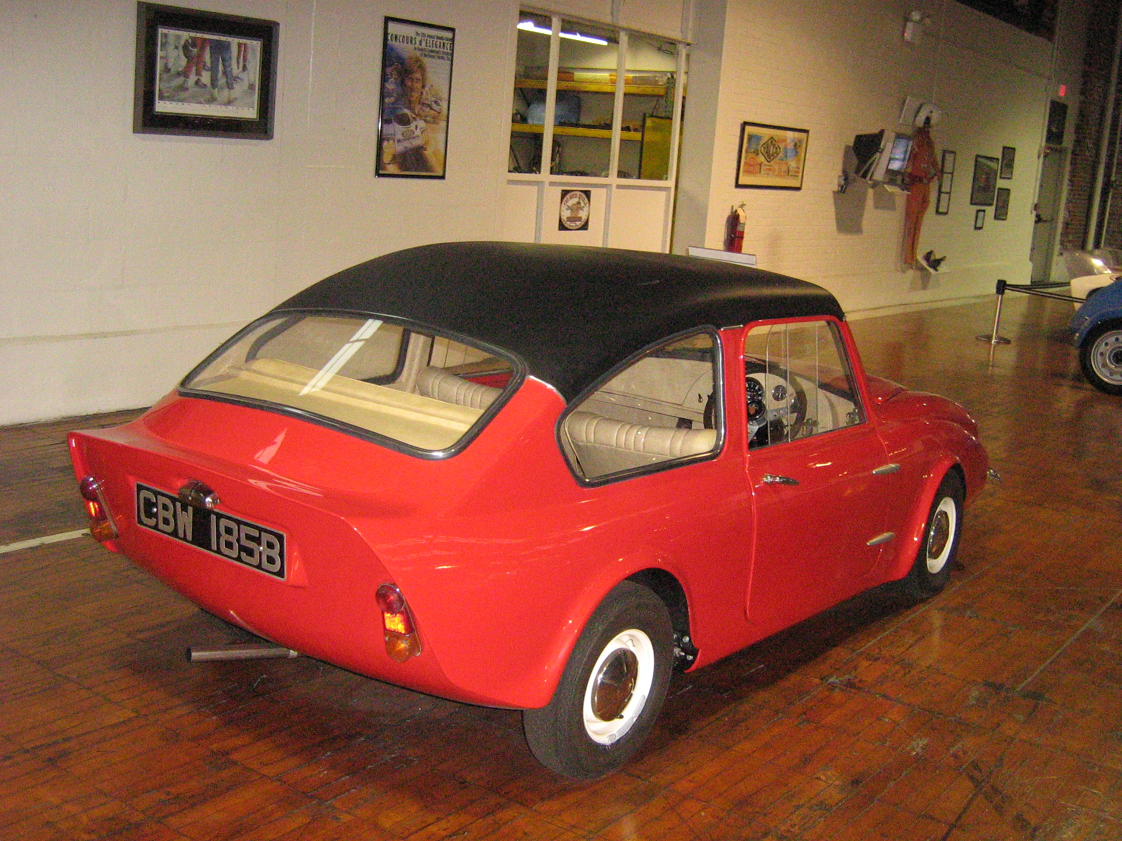 1964 Peel